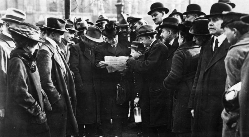 Berlin, Kapp-Putsch, Zeitungsleser Die Gegenrevolution in Berlin im März 1920 Die ersten Nachrichten gelangen in die Öffentlichkeit 6622 - Photothek Berlin ADN-ZB/Archiv Konterrevolutionärer Kapp-Putsch vom 13.-17.3.1920 in Berlin Mit dem Einmarsch der Marinebrigade Ehrhardt am 13. März in Berlin beginnt der Putsch. Am selben Tag wird eine Regierung unter Wolfgang Kapp und General von Lüttwitz gebildet. Berliner lesen ein Extrablatt der "Vossischen Zeitung" mit ersten Nachrichten über den Putsch